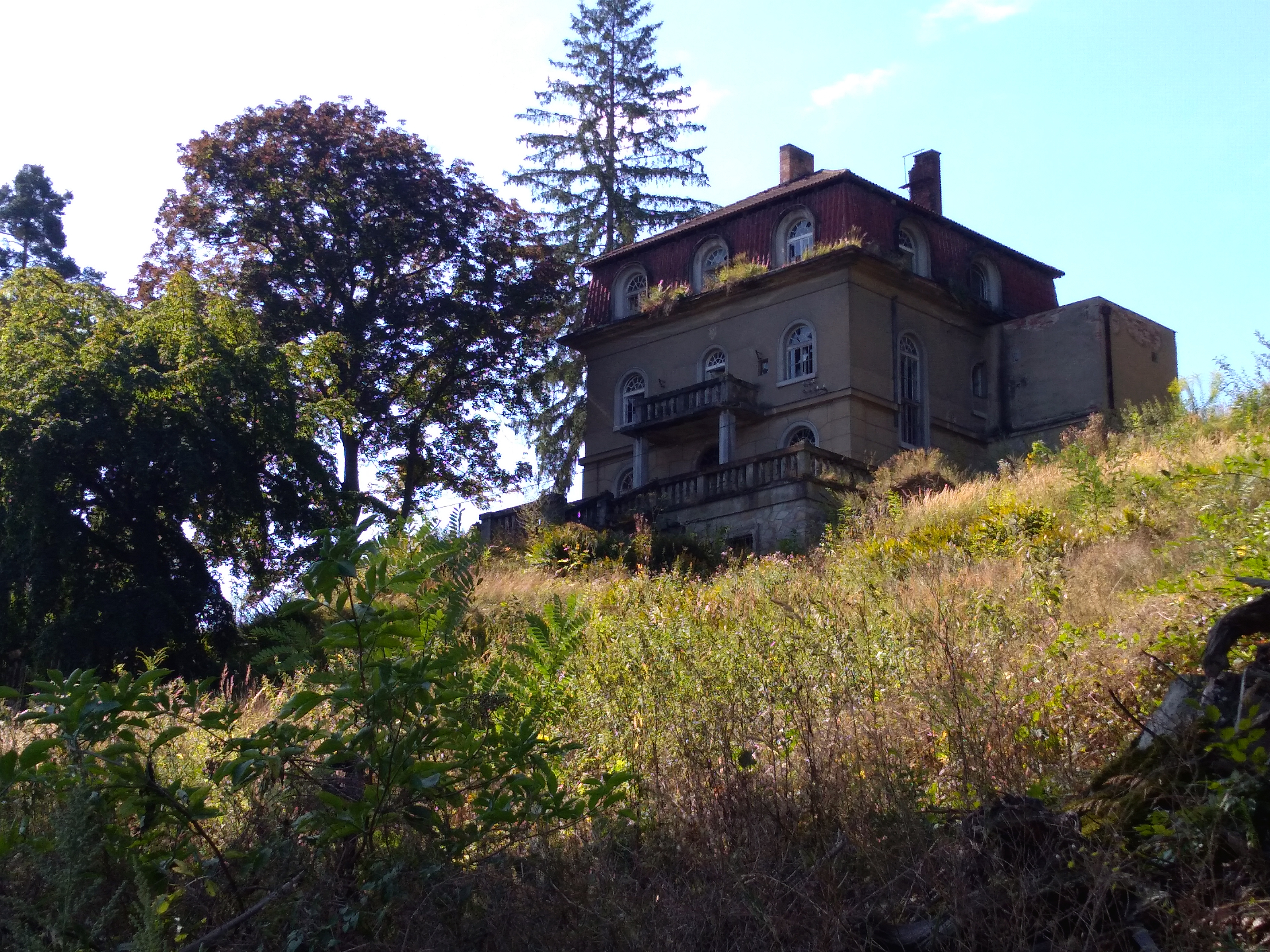 Vila Marta v Písku byla postavena rodinou Šimkových.